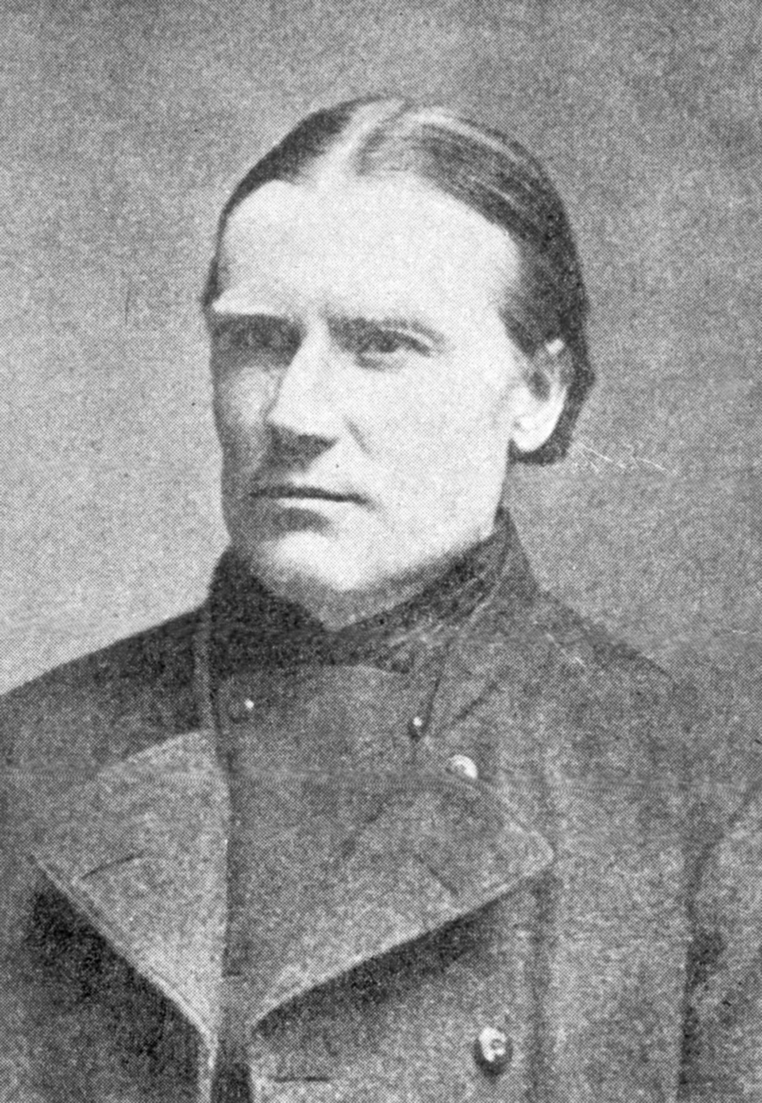 Kansanedustaja ja herännäisjohtaja Juho Malkamäki (1844–1928).